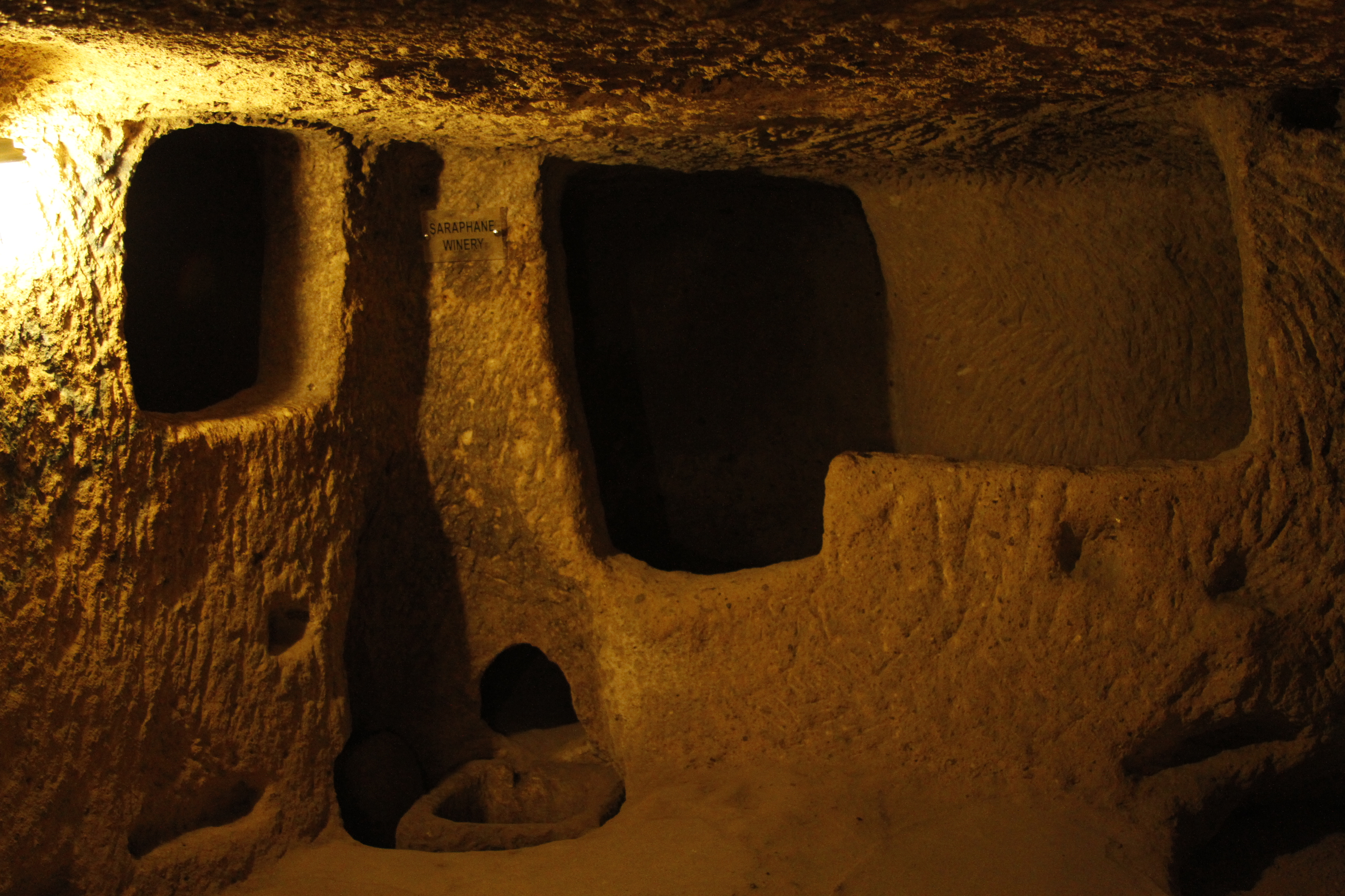 Local para fazer vinho em Derinkuyu